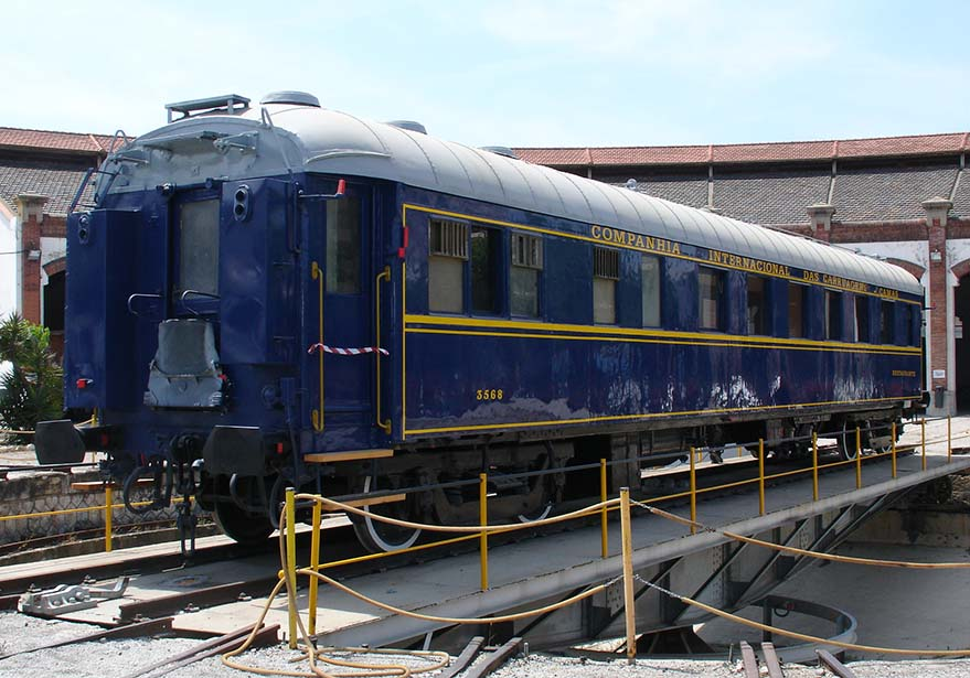 Vagó restaurant